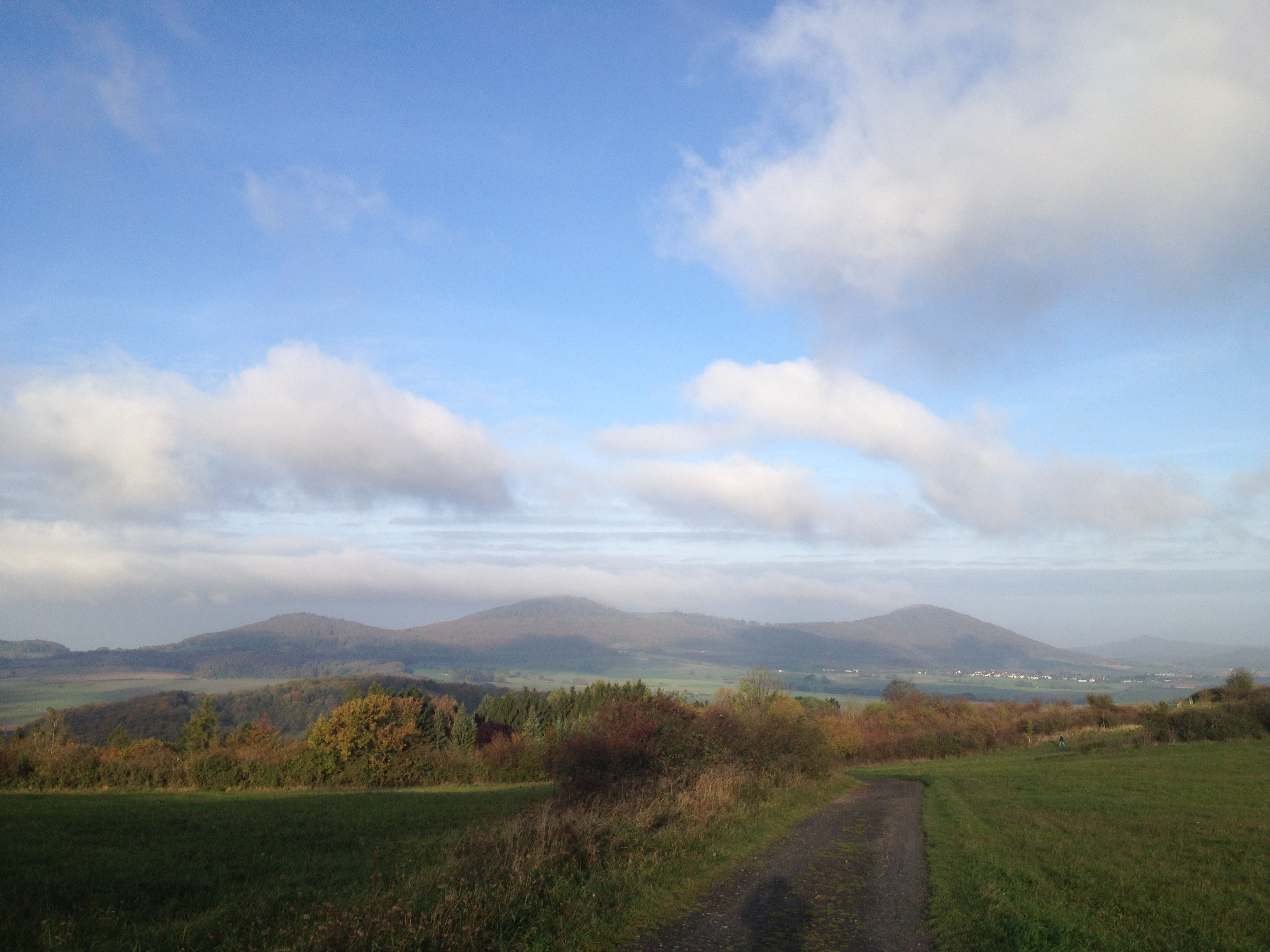 Blick vom Eco Pfad Kulturgeschichte Habichtswald in Höhe der Wochenendhäuser (Straße Im Grund) auf den Rohrberg (links), den Großen Bärenberg (mit Aussichtsturm, mitte) und den Großen Gudenberg (rechts)